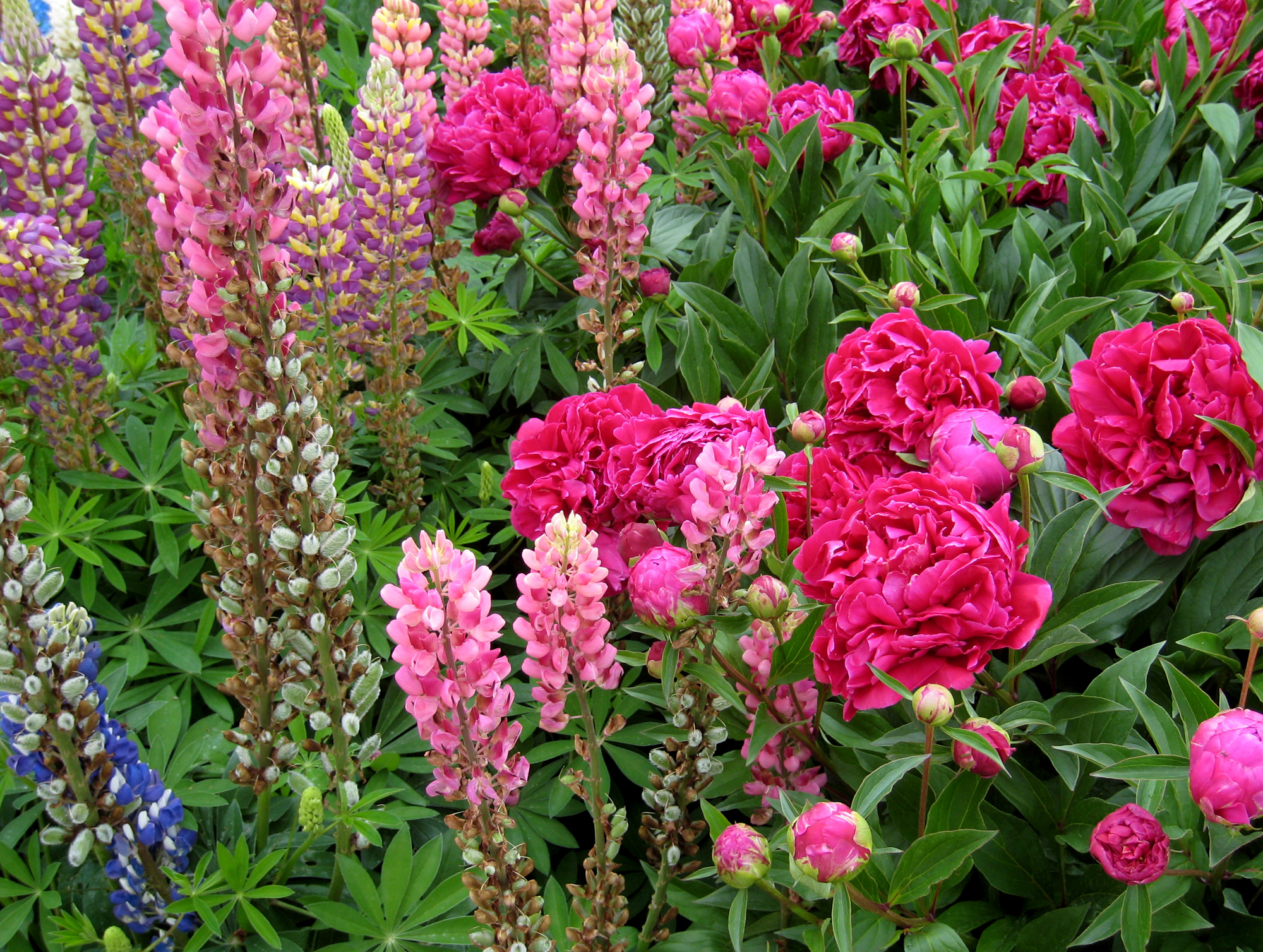 Château de Cheverny, Loir-et-Cher, France - gardens, lupines and peonies